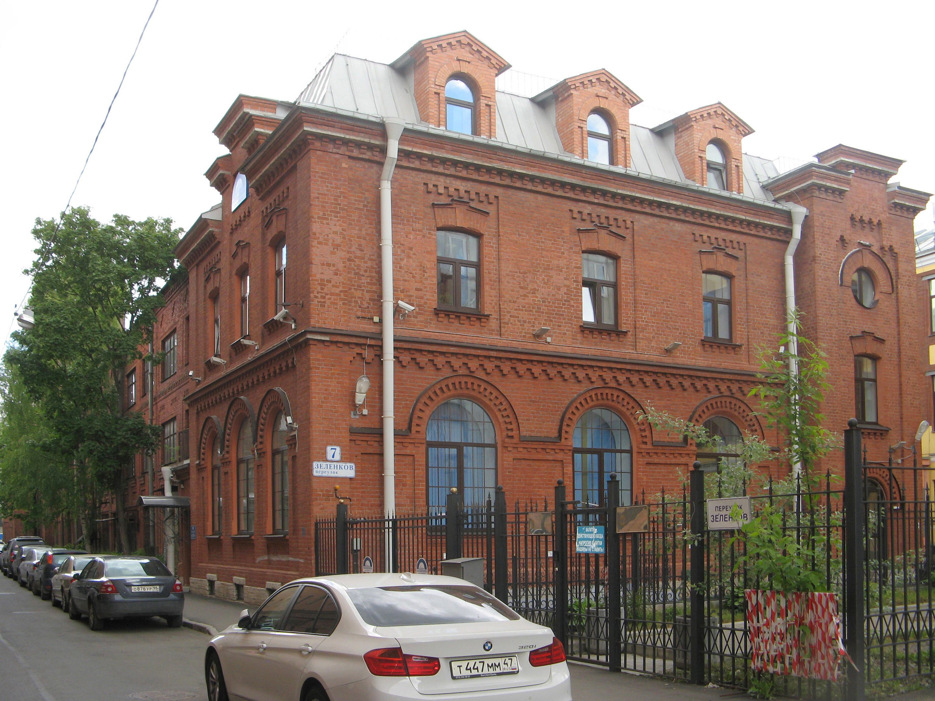 Санкт-Петербург, Зеленков переулок, дом 7